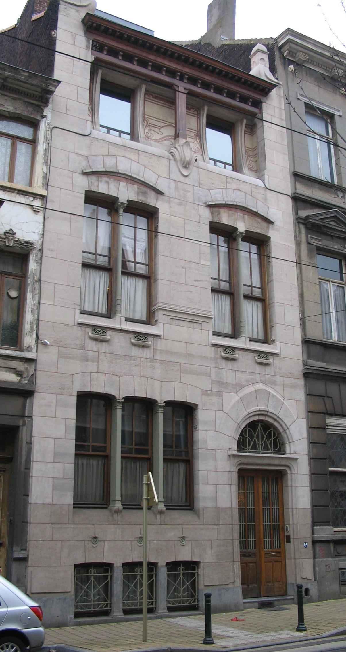 Autriquegevel